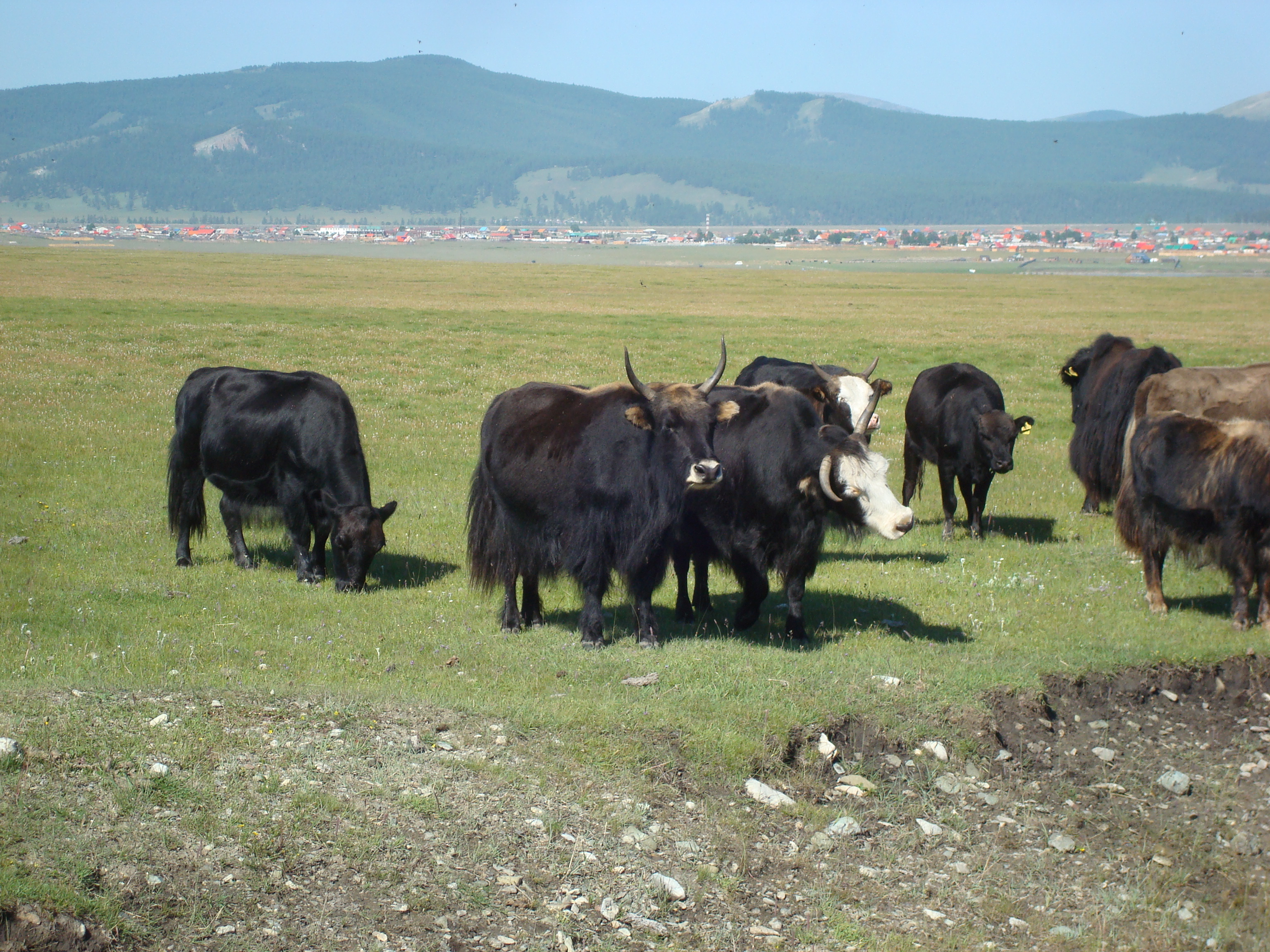 Yaks am Chöwsgöl Nuur